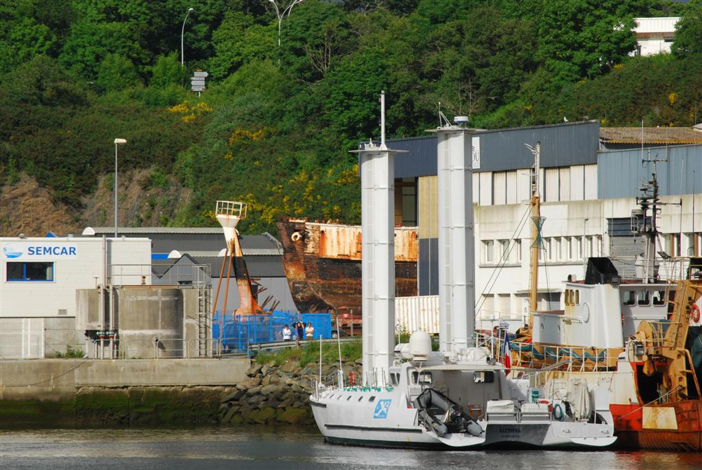 Alcyone à Concarneau, près de la Calypso